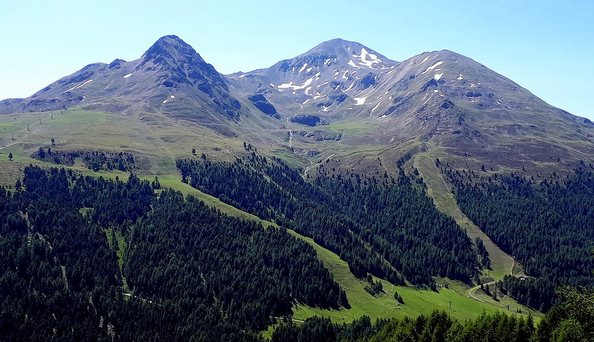 Blick auf Zehner-, Elfer- und Zwölferkopf im Rojental